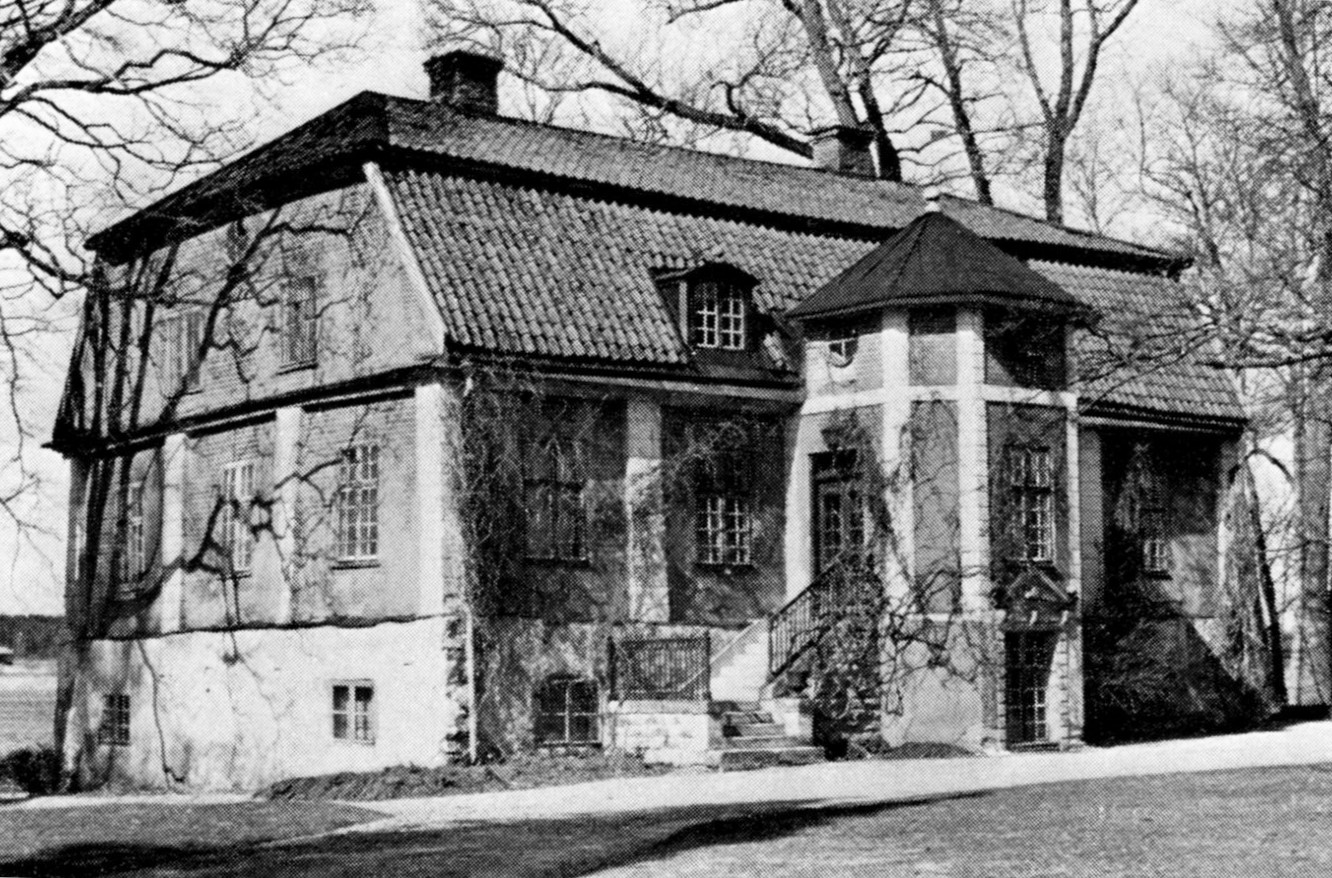 Sjöholms gård flygelbyggnad